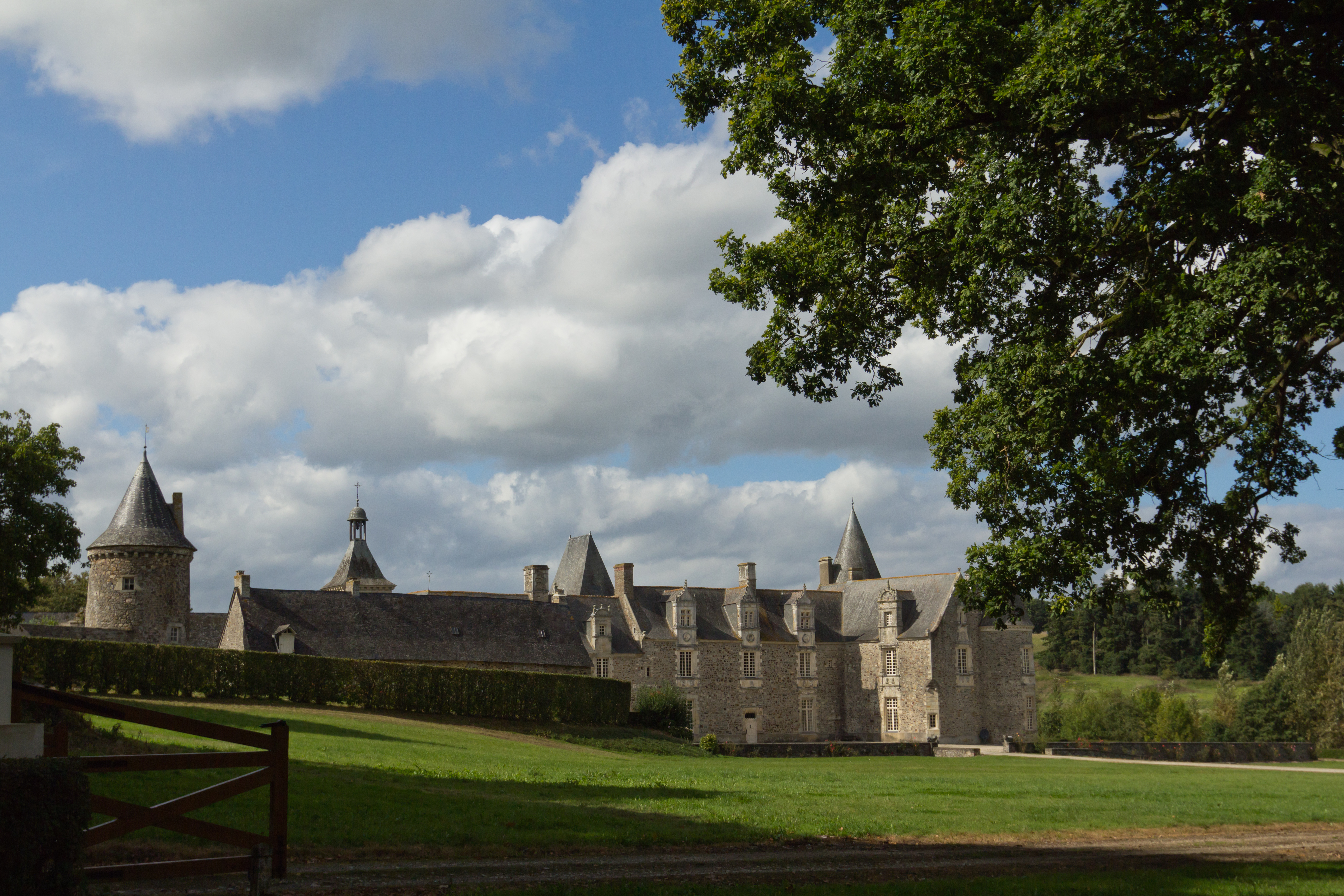 La façade est et l'aile nord sont visibles, ainsi que les toits de plusieurs dépendances. Tours et tourelles furent ajoutées à la fin du XIXe siècle par l'architecte rennais Jacques Mellet. Propriété privée fermée au public.